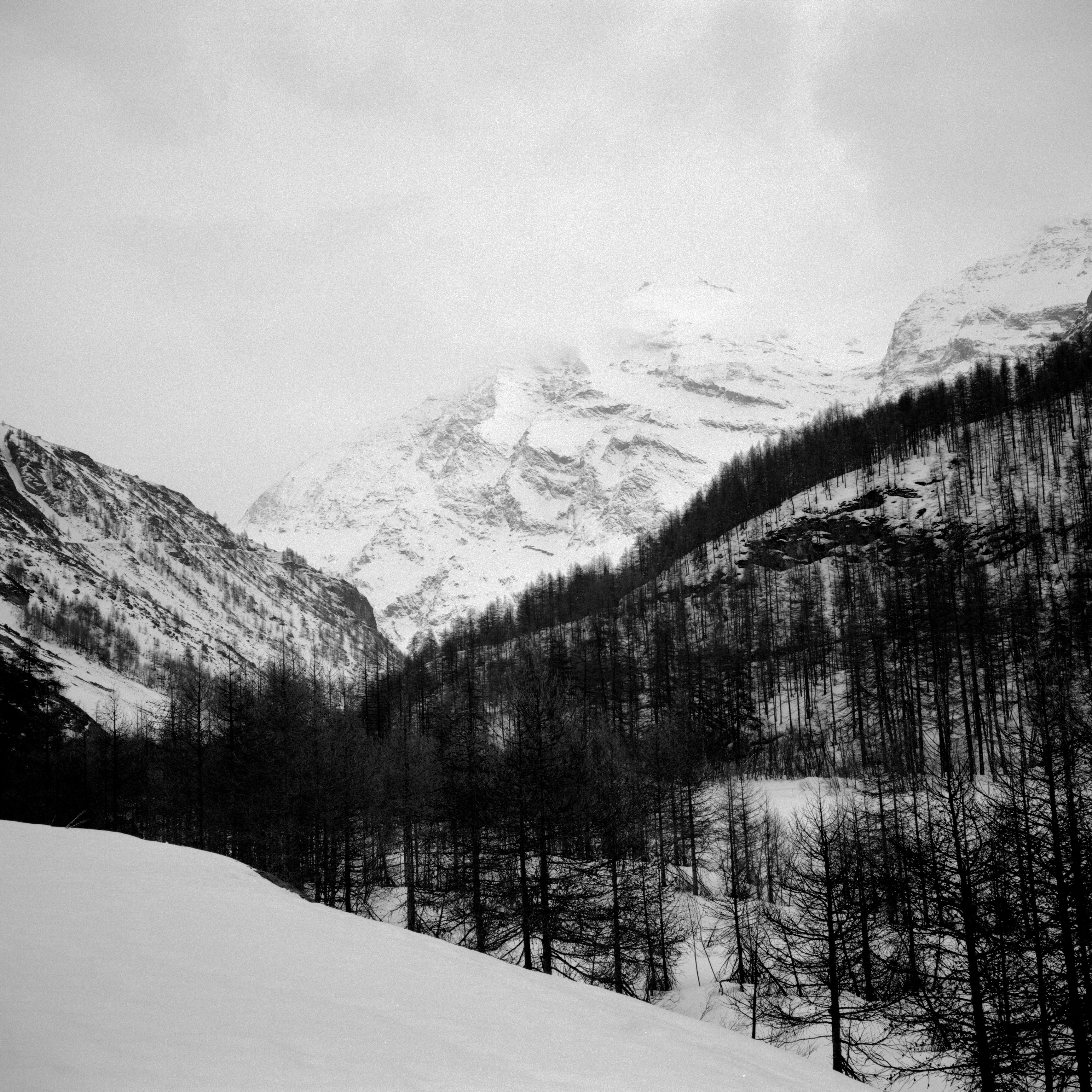 La pointe de Charbonnel en hivers, en venant de Bessans.